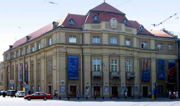 Filharmonia Krakowska